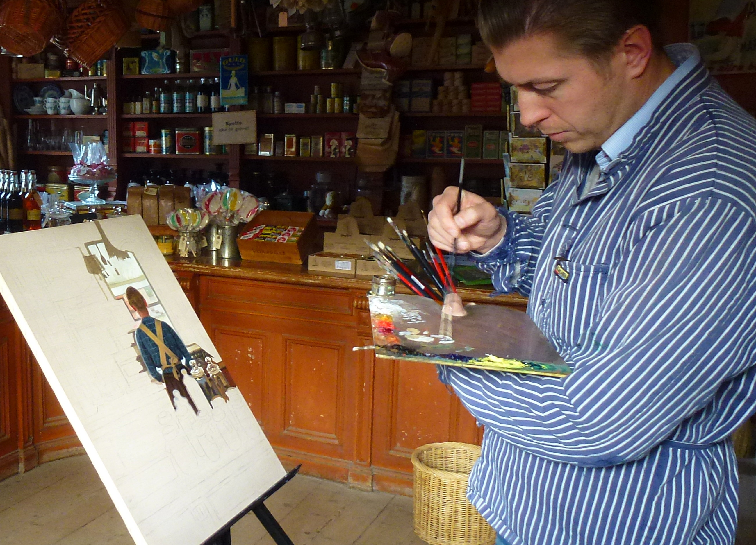 Johan Patricny målar i handelsboden på Torekällberget